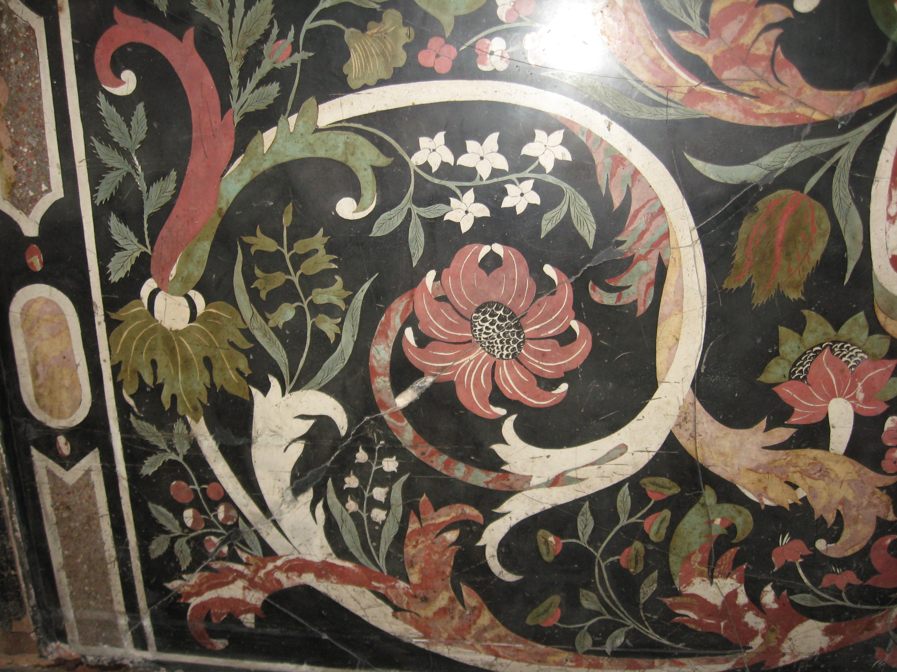 Chiesa di Sant'Ambrogio della Vittoria e annessa ex abbazia cistercense This is a photo of a monument which is part of cultural heritage of Italy.